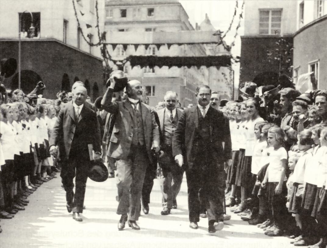 Eröffnung der Wohnhausanlage Reismannhof in Wien-Meidling durch Bürgermeister Karl Seitz, rechts Edmund Reismann, 1926